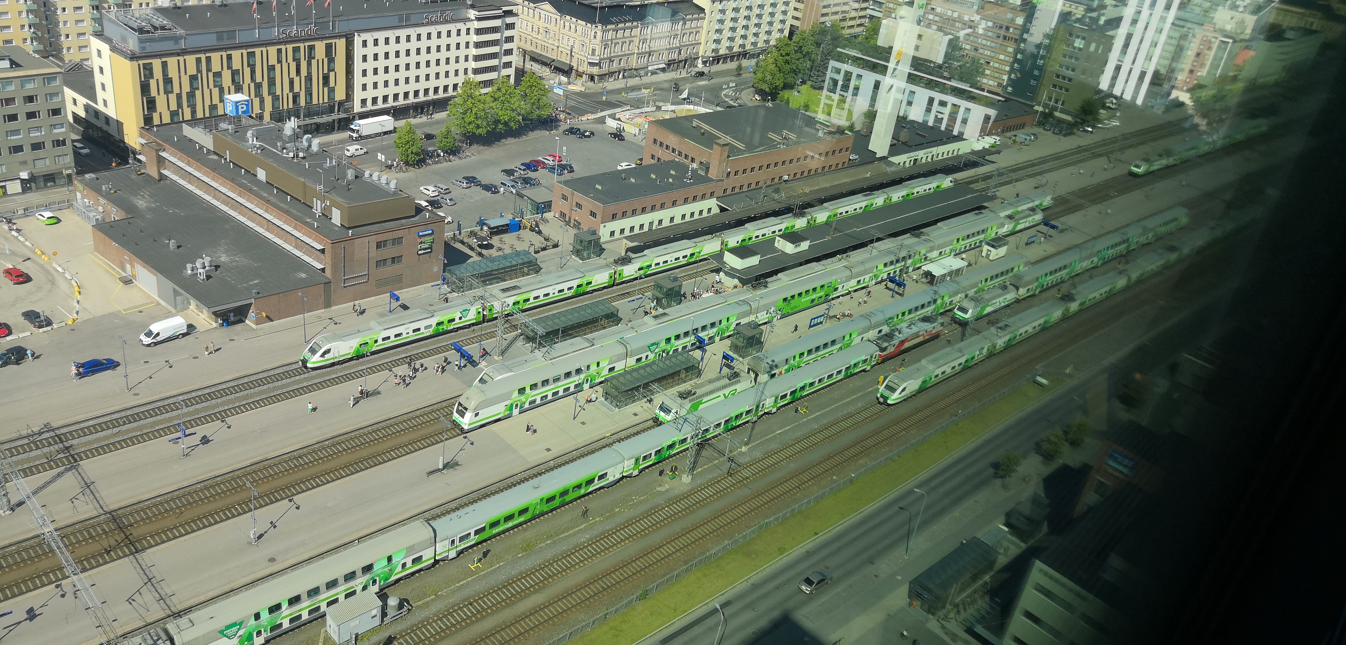 Tampereen rautatieasema Torni-hotellista kuvattuna 24.7.2019